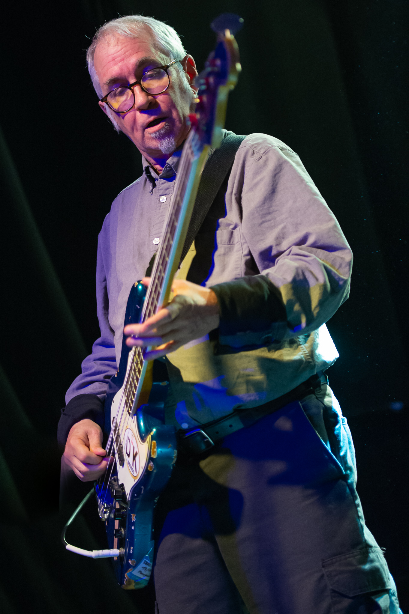 Concertbüro Franken,Dead Kennedys,Der Hirsch,Geoffrey Lyall,Klaus Flouride,Konzert,Livekonzert,Livemusik